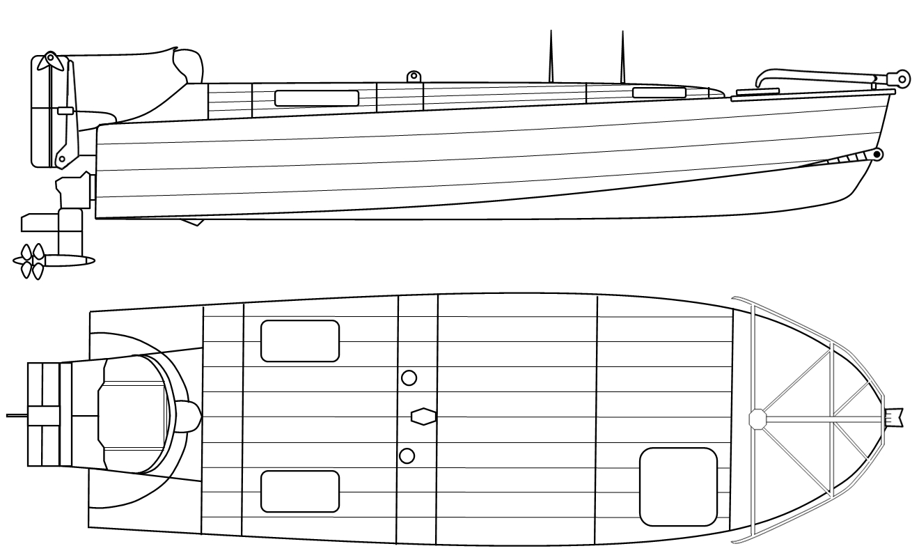 Italienisches Sprengbooz M.T.M.